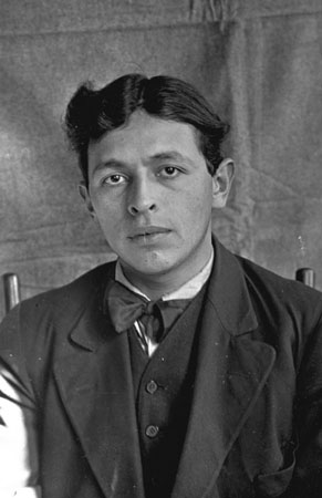 William Beynon